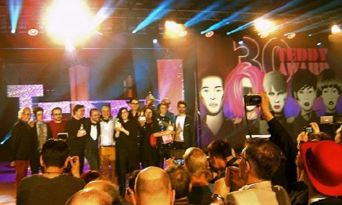 30. Teddy Award bei der Berlinale 2016 - Gewinner bei der Verleihung 19. Februar 2016 in "Station" Berlin.